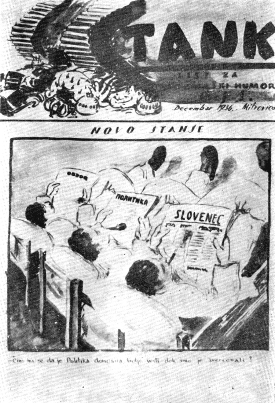 Srpskohrvatski / српскохрватски: Satirični list "Tank" koji je izdavao komunistički Kaznionski Komitet u zatvoru u Sremskoj Mitrovici 1936. godine.